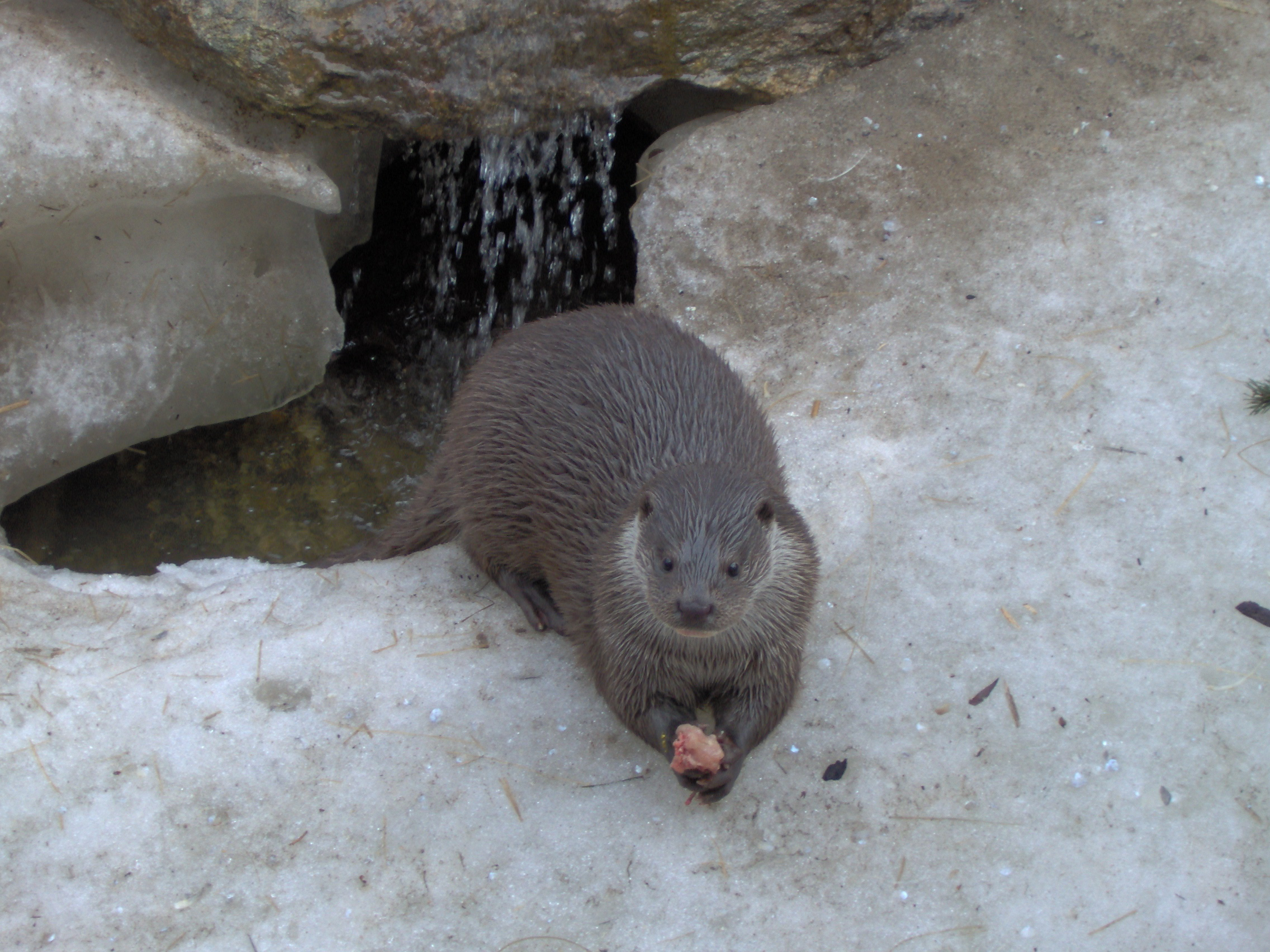 Lutra lutra